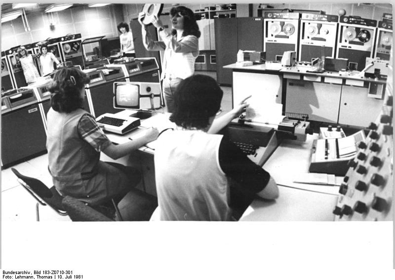 Für Bezieher des ADN-Reportagedienstes! Zum Beitrag: Wo ein Treffer kein Glücksspiel ist-Wirkstoffforscher im Dialog mit dem Computer - ADN-ZB-Lehmann-10.7.81-bb - Blick in das Rechenzentrum des Chemiekombinates Bitterfeld. In diesem Bereich findet das im Kombinat entwickelte EDV-System WIFODATA Einsatz, mit dem den Wissenschaftlern ein Werkzeug in die Hand gegeben ist, das ihnen hilft, ihre Aufgaben bei der Forschung nach neuen Wirkstoffen zur Produktion von Pflanzenschutz- und Schädlingsbekämpfungsmitteln, Pharmaka und vieler anderer Stoffe gezielter, schneller und kostengünstiger zu lösen. (Bitte beachten Sie hierzu auch Z0710-300N, 302N, 303N!)